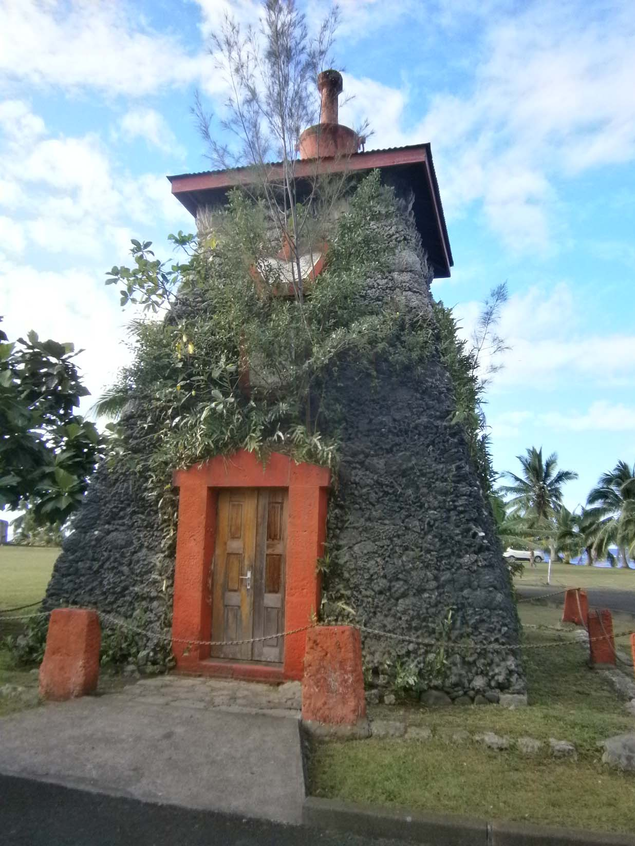 Tombeau du Roi Pamare V et de sa famille